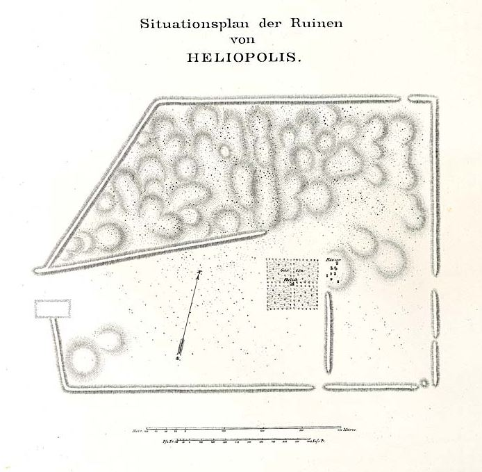 estratto dalla tavola 1.BI.55 dell'opera di Lepsius in cui si mostra la planimetria dell'area delle rovine di Heliopolis